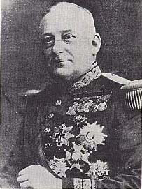 Portrait of Miguel Primo de Rivera